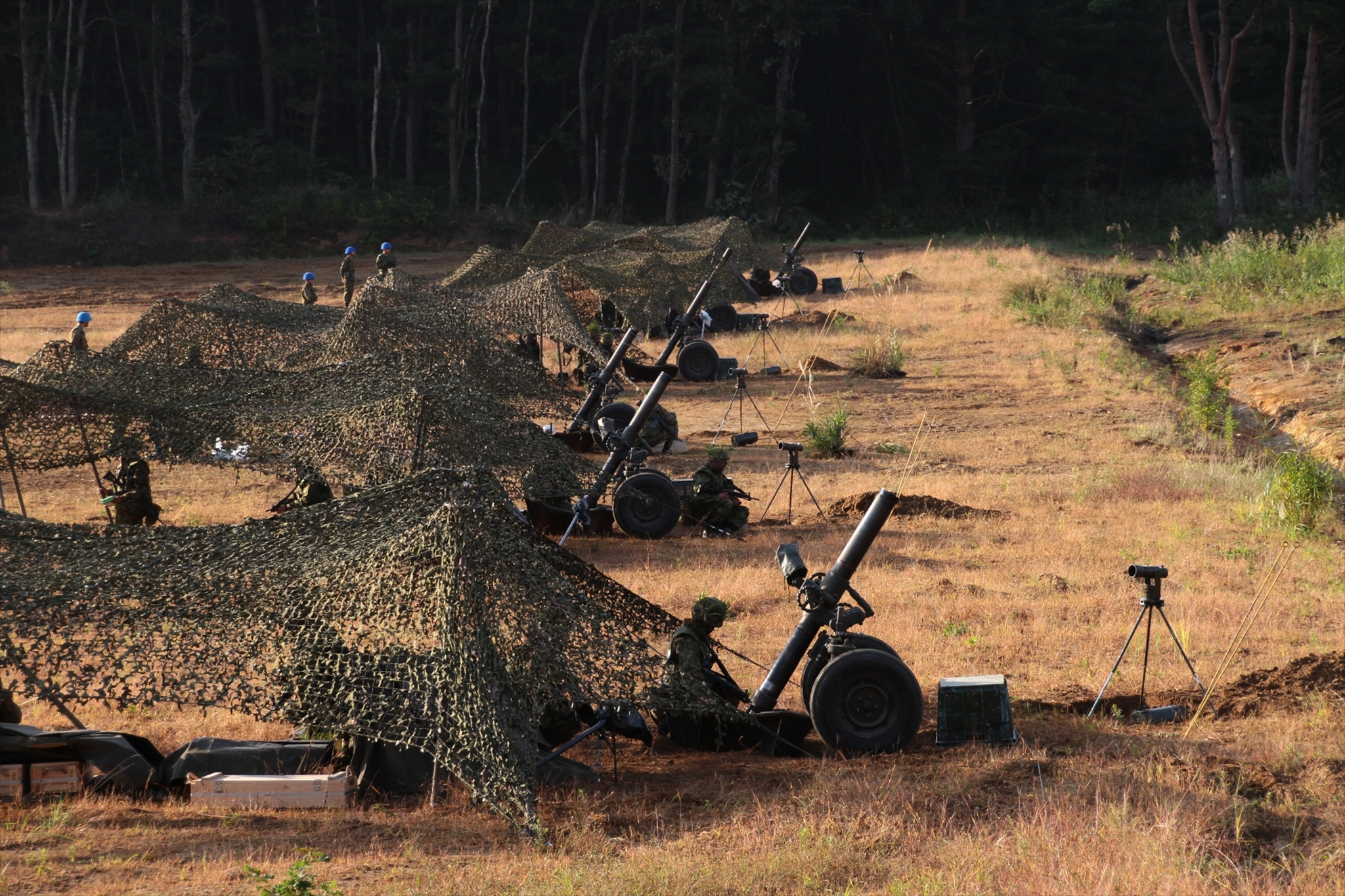 Title 20i-NK-2 (師団戦闘総合射撃競技会「砲列」)_R.JPG Album 教育訓練等 戦闘総合射撃